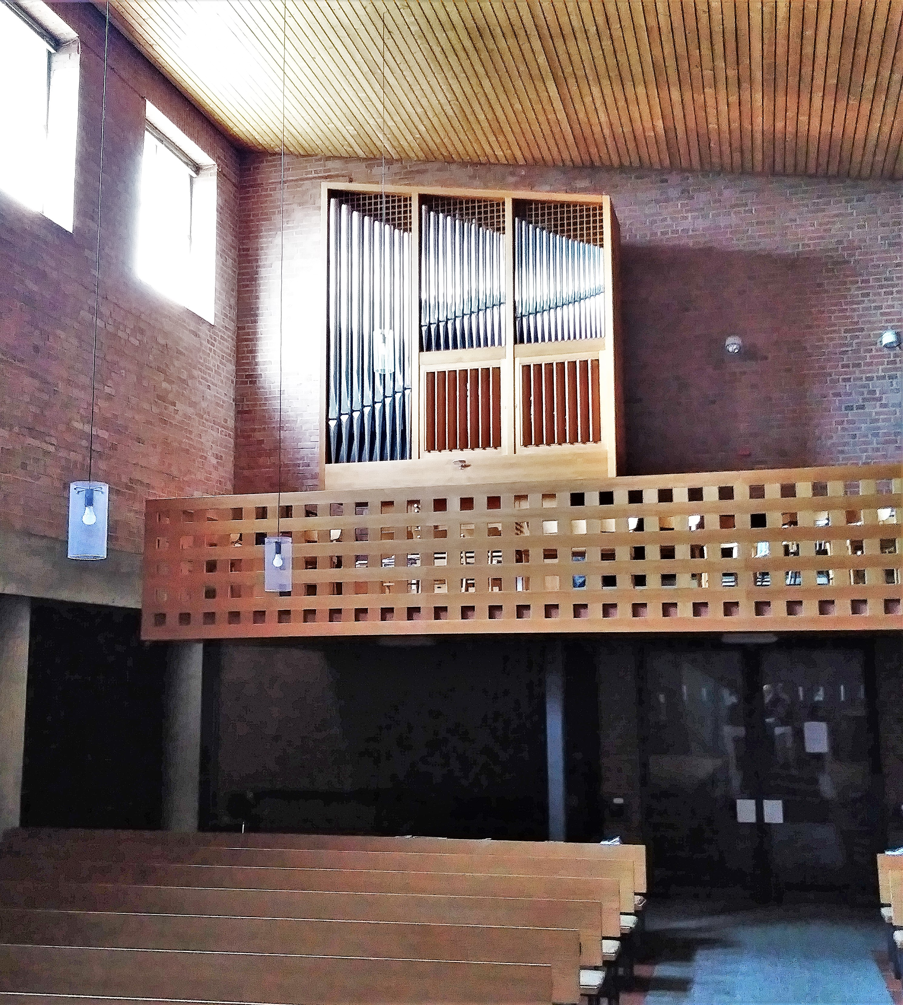 Deininger-&-Renner-Orgel der Passionskirche München-Obersendling.